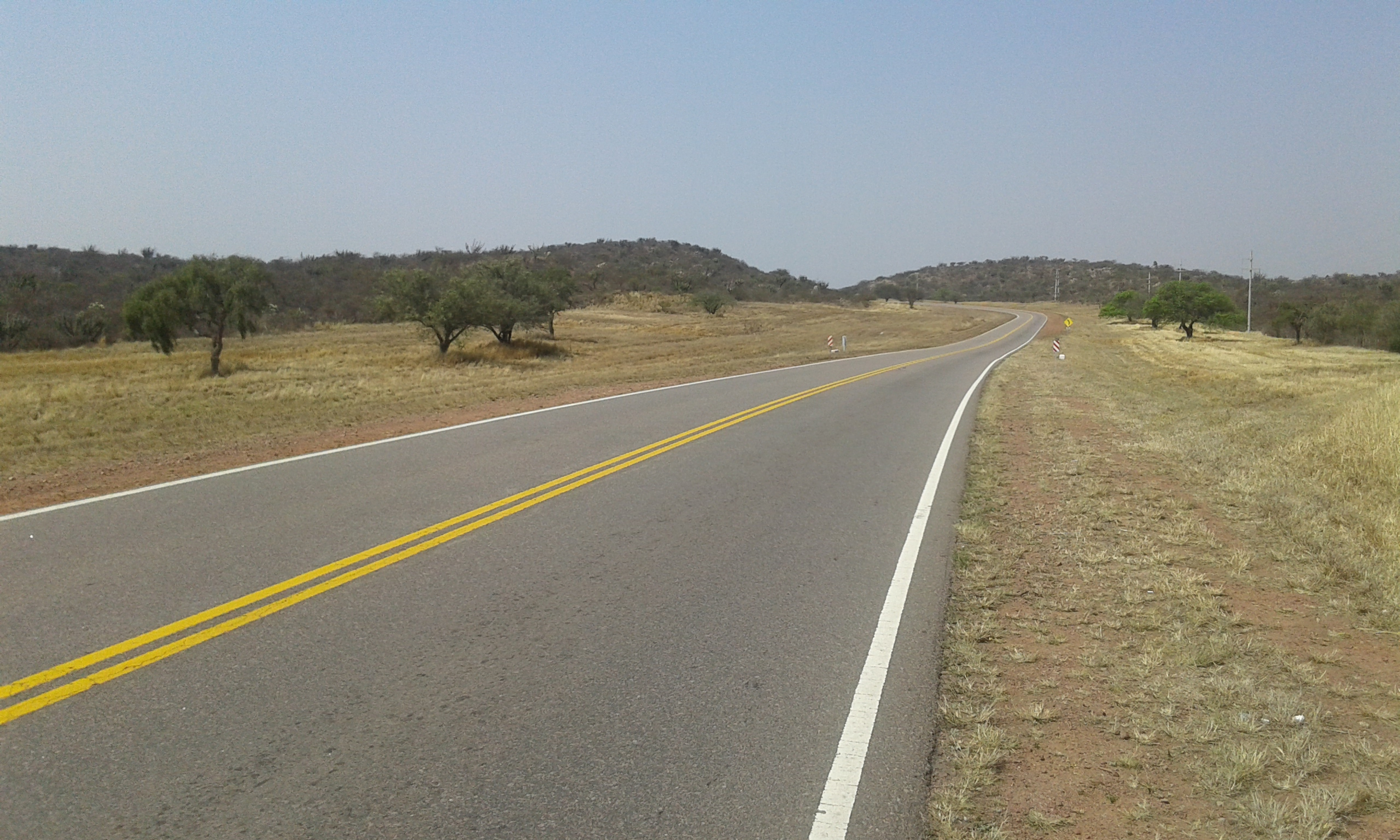 Sierras de Ambargasta, vistas desde la ruta nacional 9.